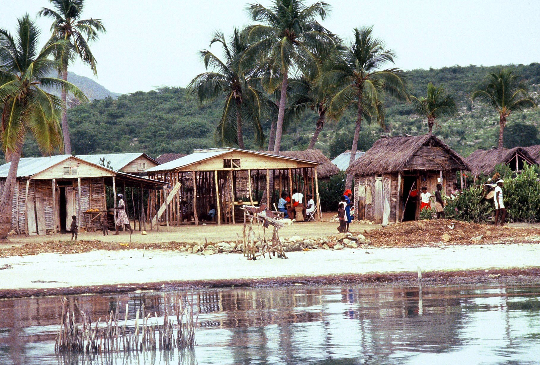 Houses on Île de la Gonâve